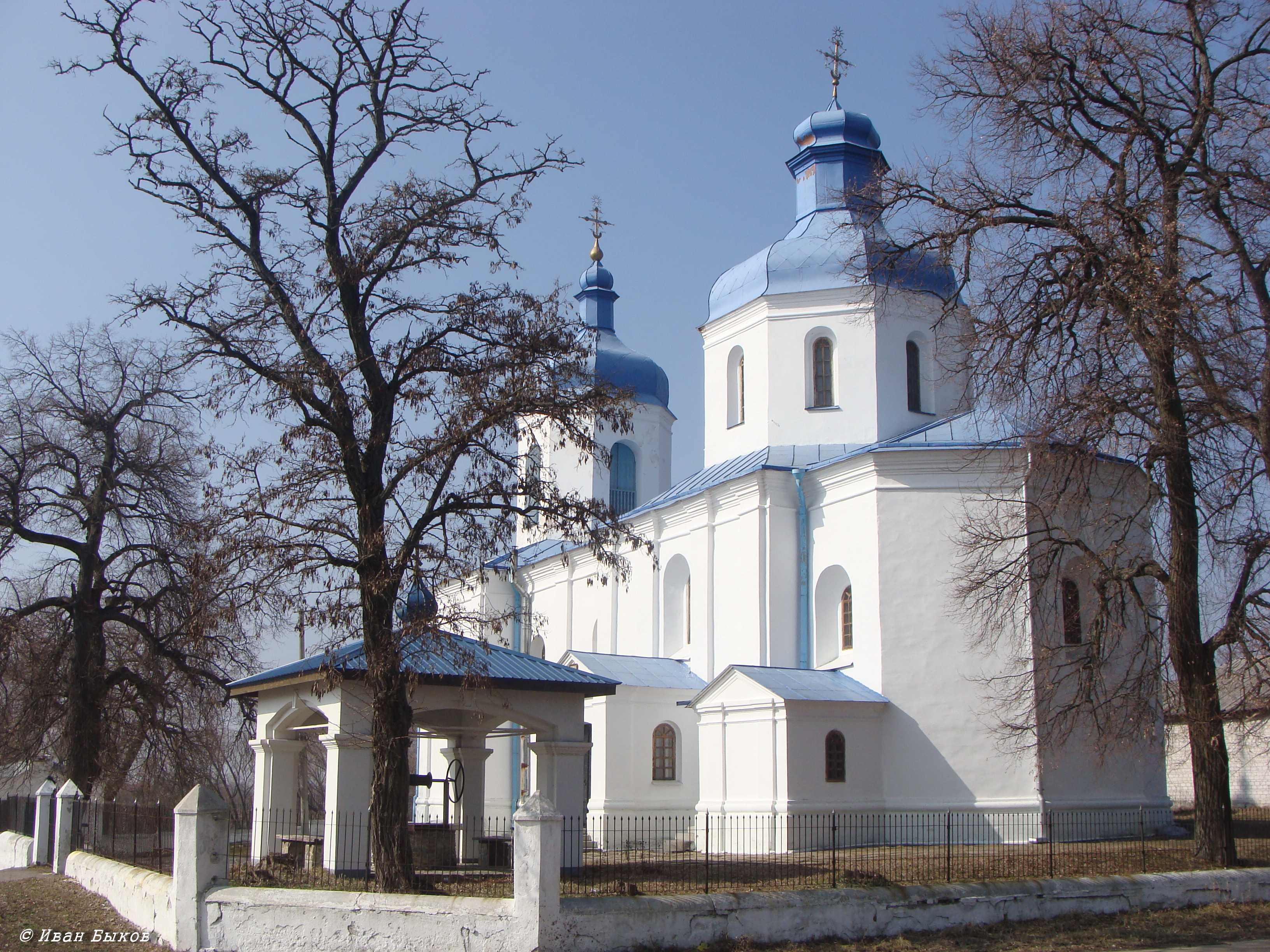 Покровська церква (мур.), село Сулимівка, вул. Леніна 1